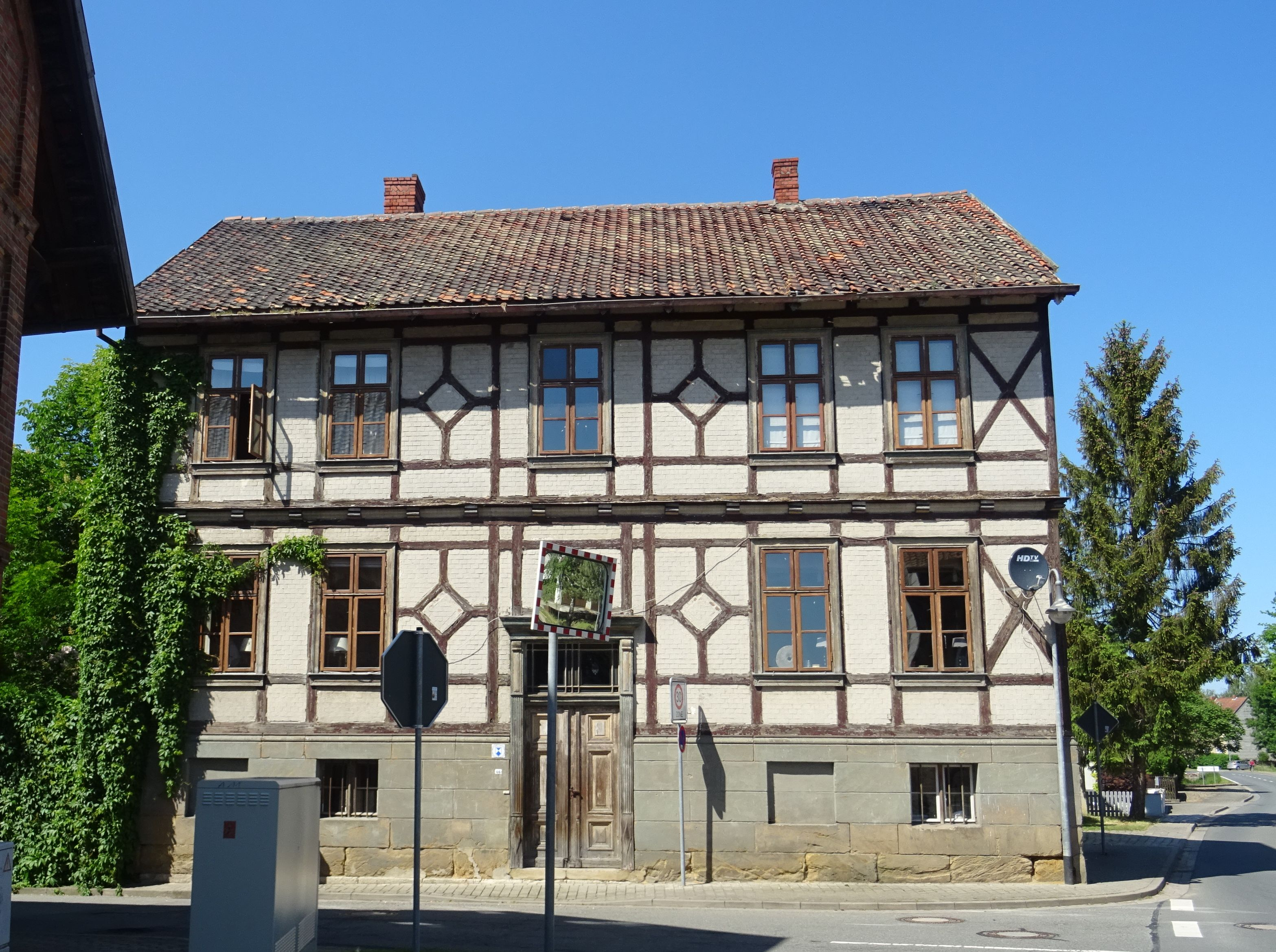 Dedeleben, denkmalgeschütztes Bauernhaus Ernst-Thälmann-Str 66